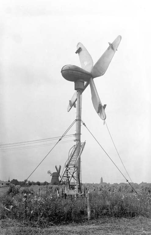 Elektrizität aus der Luft, mittels eines Windkraftrades ! Das Windkraftrad welches auf einem freien Gelände bei Berlin aufgestellt ist, erzeugt durch die Drehung der Propeller Elektrizität. Die Versuche sind voll gelungen.